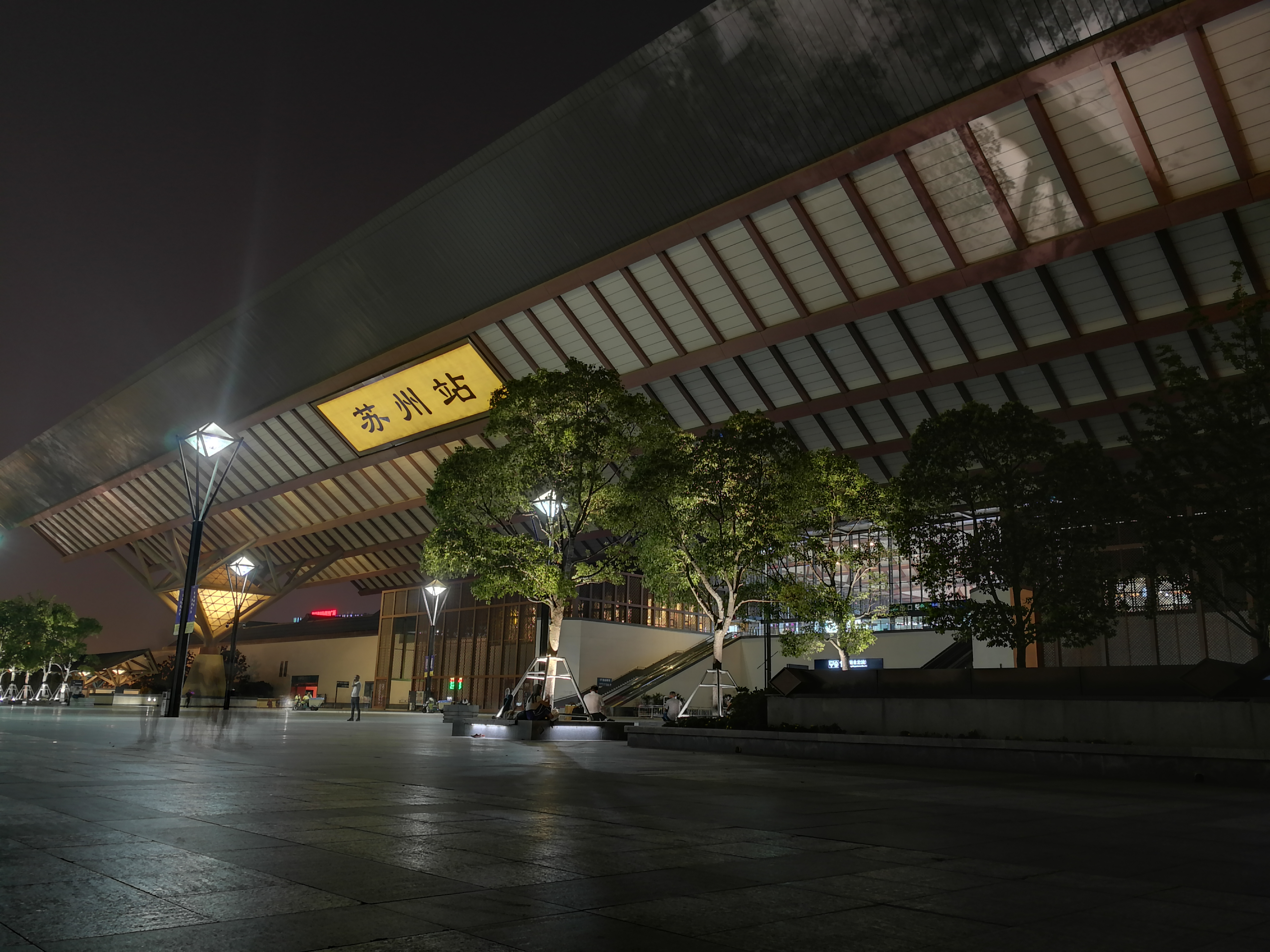 江苏省苏州市姑苏区苏州站夜景